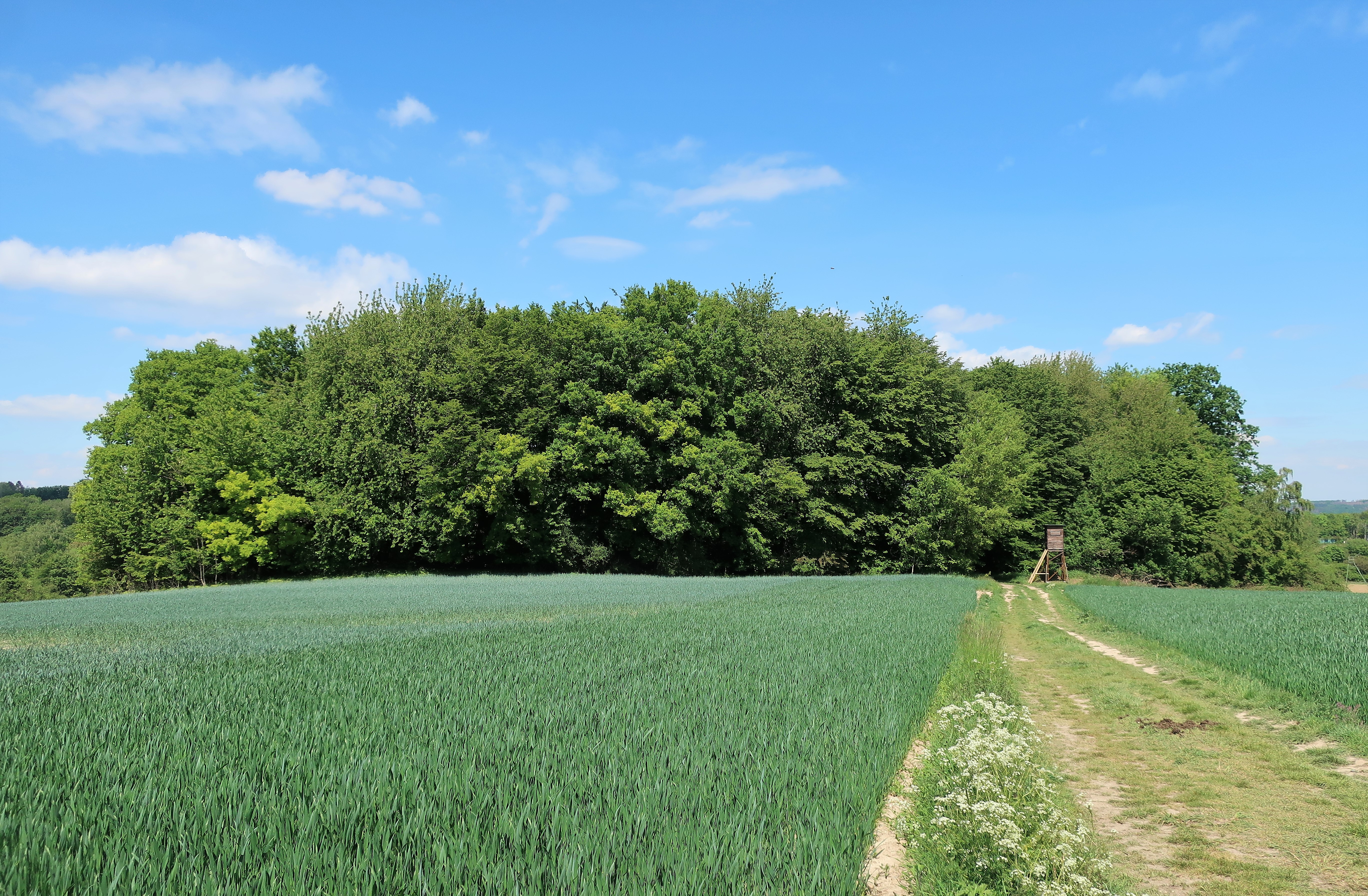 Geschützter Landschaftsbestandteil 1.4.2.61 „Waldstück mit Doline Bredde“ in Hagen, südwestlich von Holthausen. Der Bereich liegt inmitten einer landwirtschaftlich genutzen Fläche (Wiese und Acker). Es handelt sich um einen ehemals als Niederwald bewirtschafteten Laubwaldbestand mit Lesesteinhaufen und viel Totholz. Am südöstlichen Ende schließt eine Doline über Massenkalk des Oberen Mitteldevons an, die verfüllt wurde.